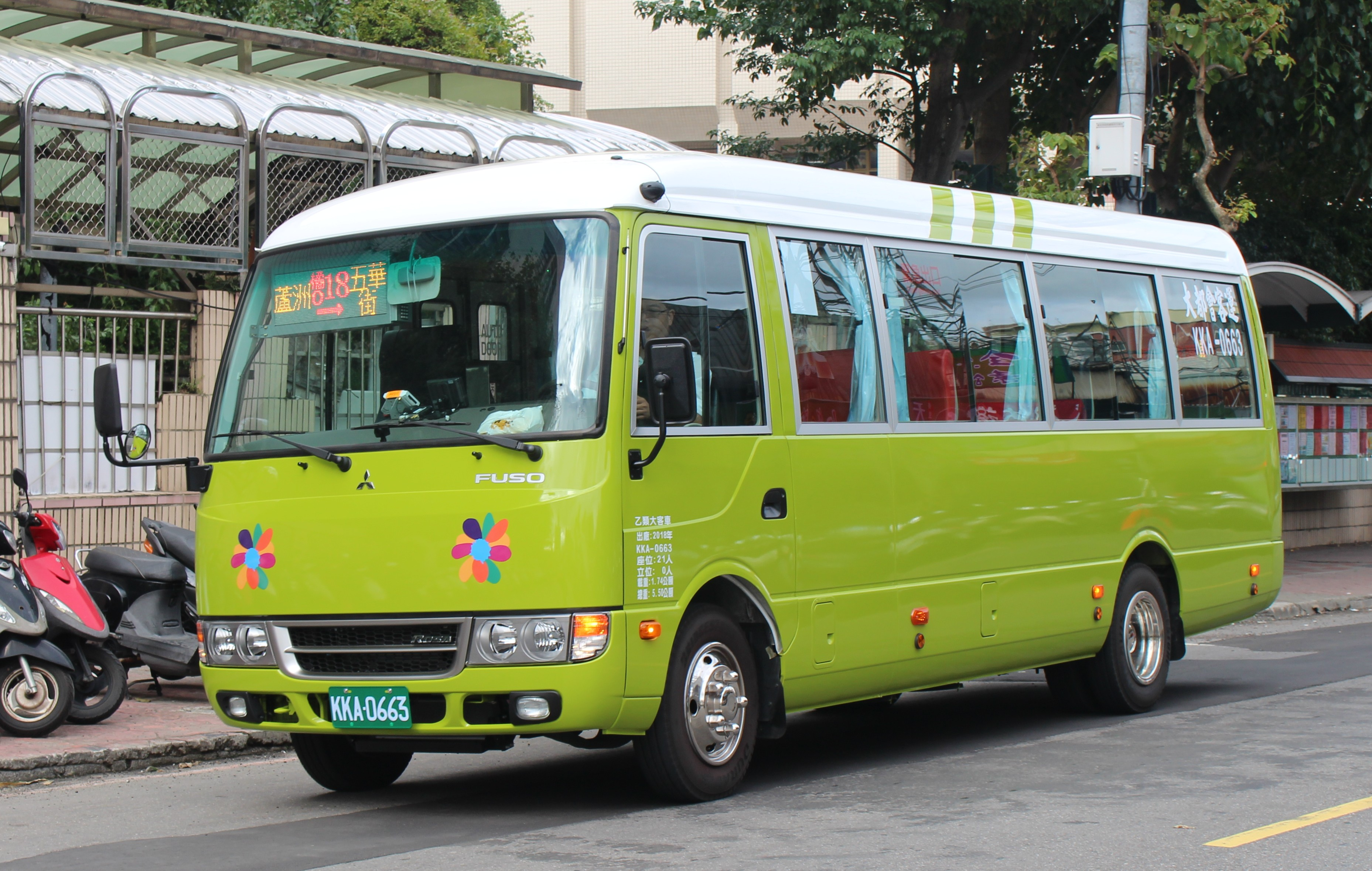 大都會客運2018 ROSA BE641G KKA-0663 橘18